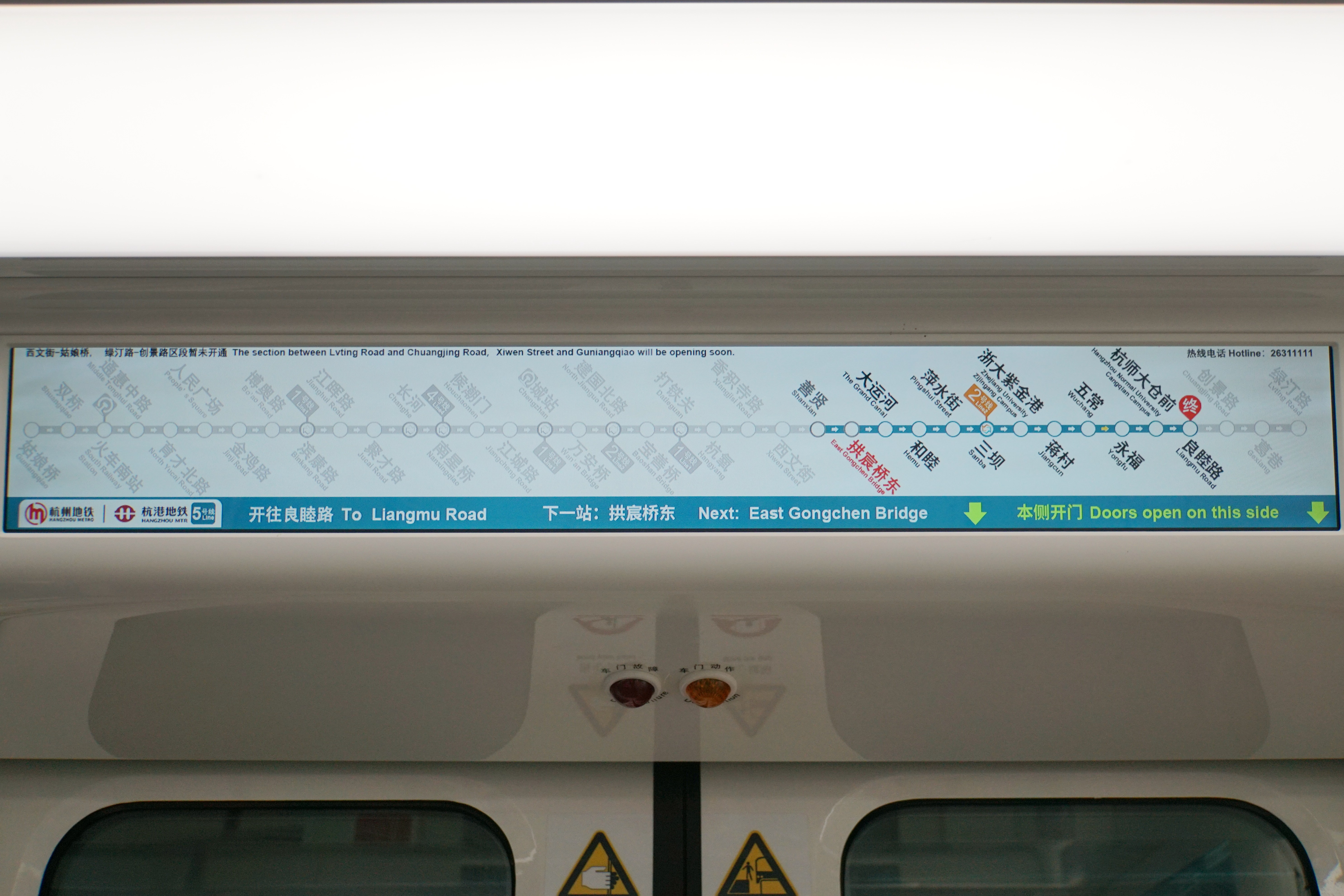 5号线车内LCD屏幕路线图